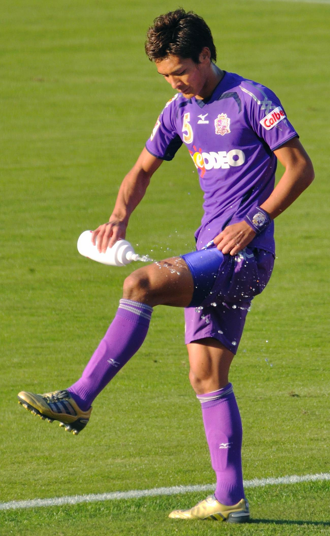 Tomoaki Makino DSC_7708